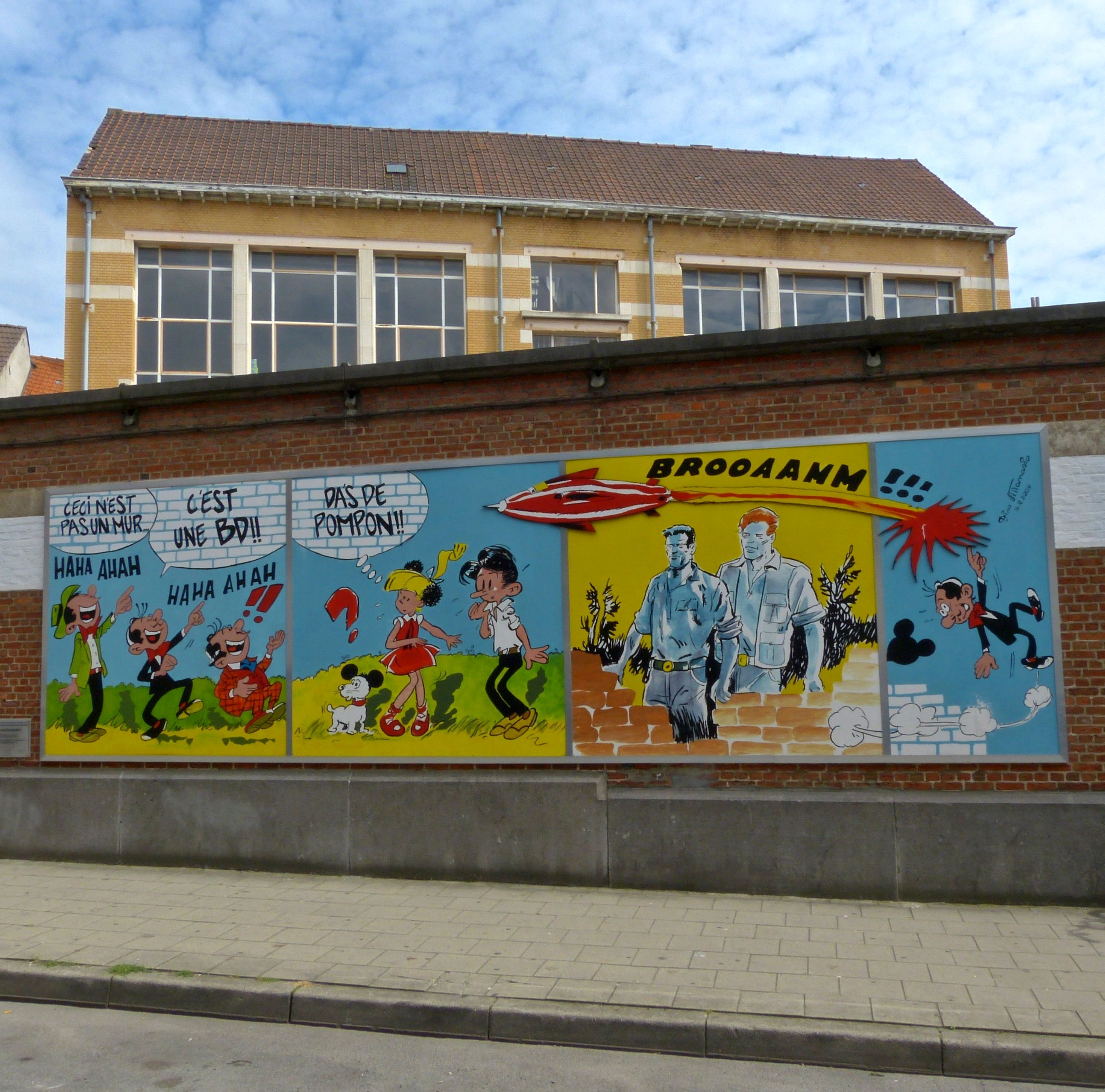 Stripmuur Signor Spaghetti te Koekelberg (Brussel)